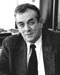 Барбараш Леонид Семёнович, академик РАМН